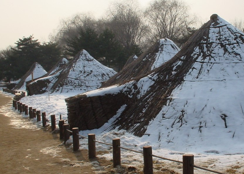 서울 송파구 암사동 신석기 시대 유적지